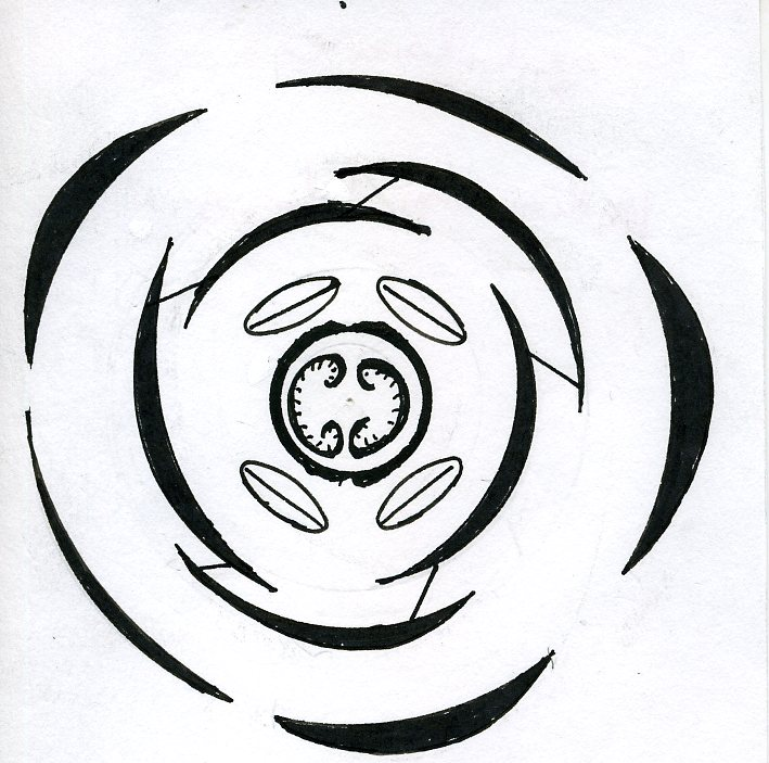 bloemdiagram Koningskaars (Verbascum thapsus), Verbascum floral diagram